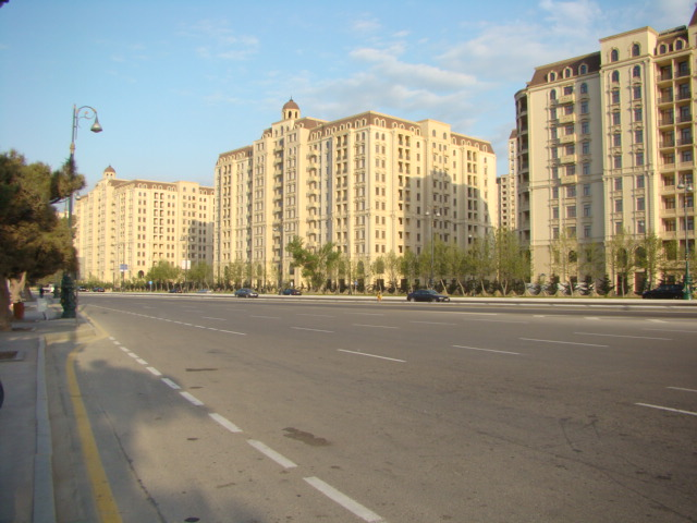 Bakıdakı Heydər Əliyev prospektində Yeni binalar